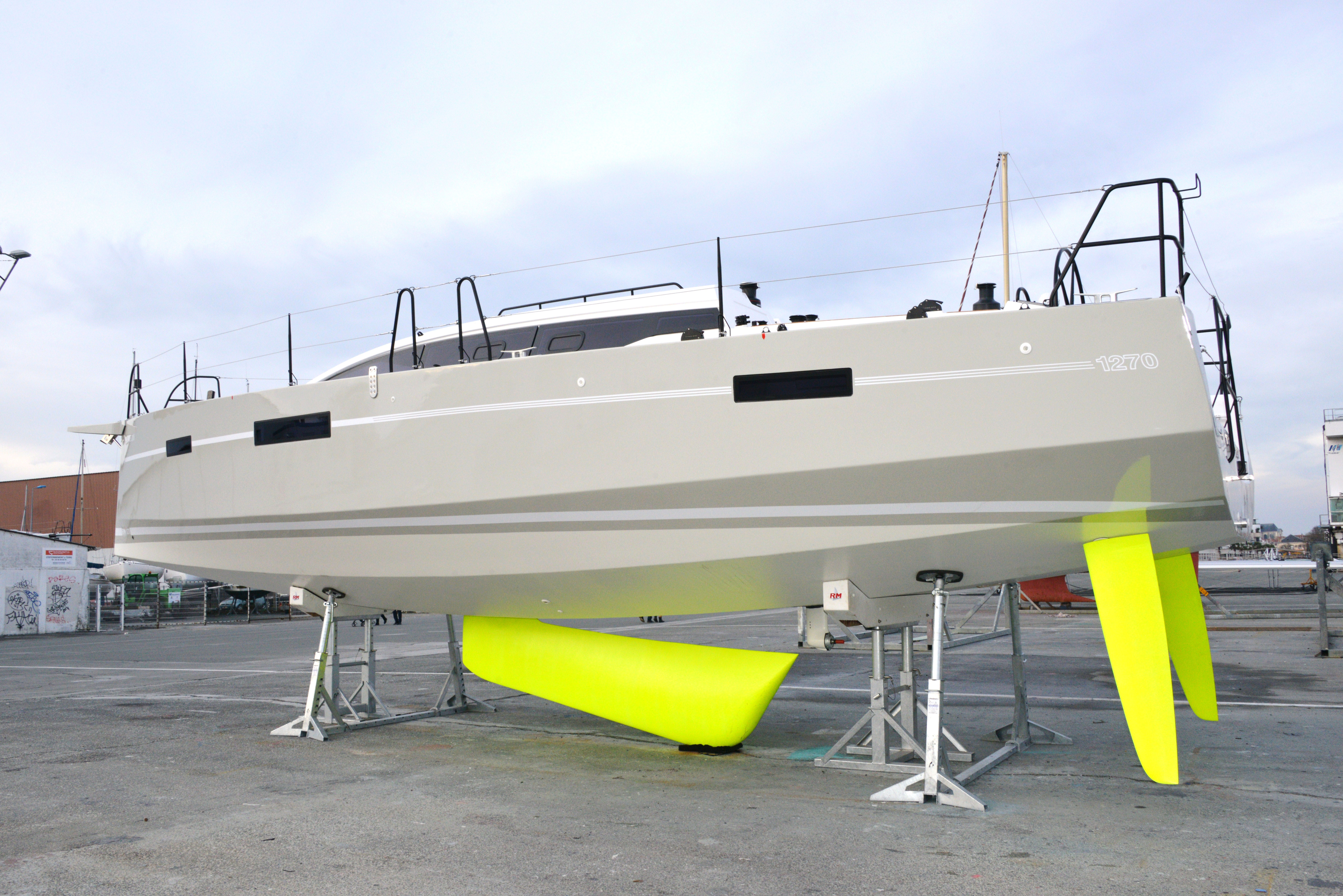 Sur le plateau nautique de la Ville en Bois, le voilier « Tavros » sur bers. Ce voilier est un RM 1270 version deux gouvernails et quille relevable basculante. « Tavros » est immatriculé à Bayonne (BA). La Rochelle, Charente-Maritime, France.